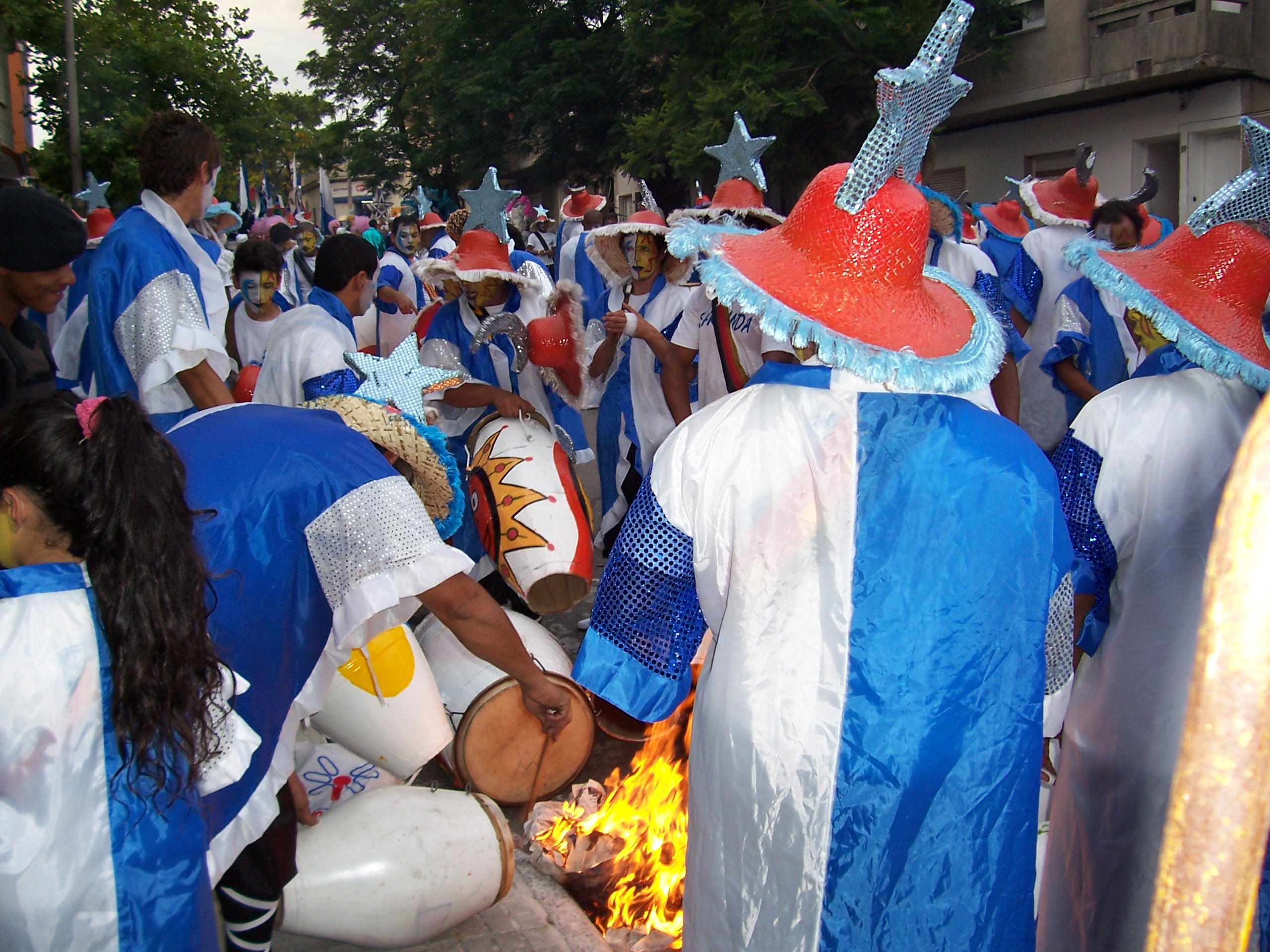 Het opwarmen van de trommels tijdens de "Llamadas", Carnaval in Uruguay 2006